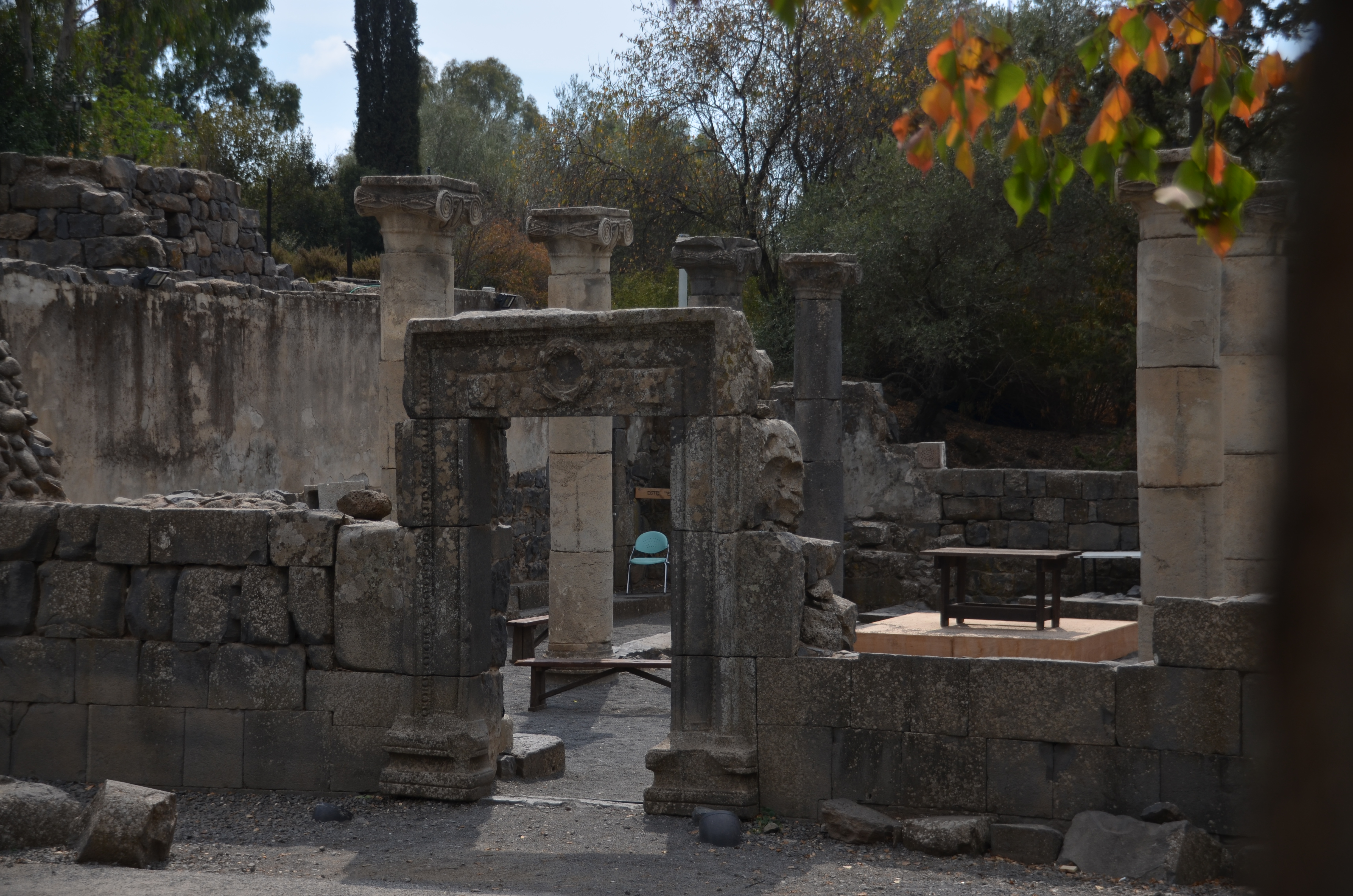 בית הכנסת העתיק בקצרין מצוי באתר, מזרחית לעיר. בית הכנסת משוחזר בחלקו. לידו, שוחזר אף חלק מהכפר היהודי שהיה במקום. בין השאר, אחד הבתים צויד בחפצים מאופיינים לתקופת התלמוד. בית הכנסת השתמר יחסית יפה ונערכים בו עד היום, מפעם לפעם, טקסים דתיים. לפי הערכת צבי מעוז, החוקר האחרון של האתר, היו בכפר 75 משפחות ו-300 נפש.